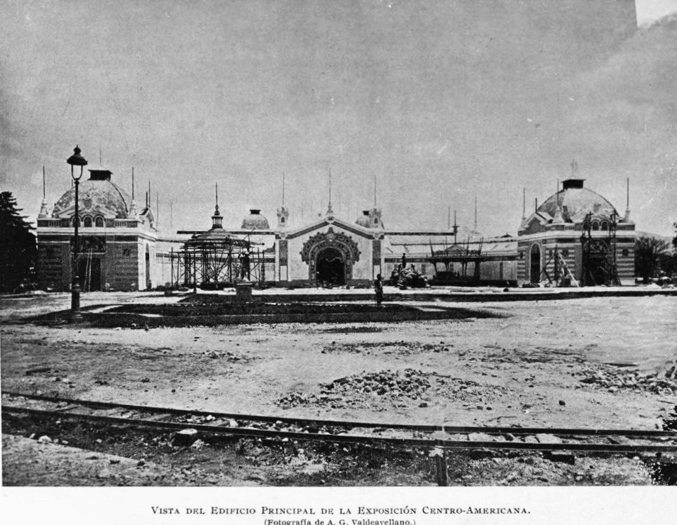 Pabellón de la exposición centroamericana. 1897